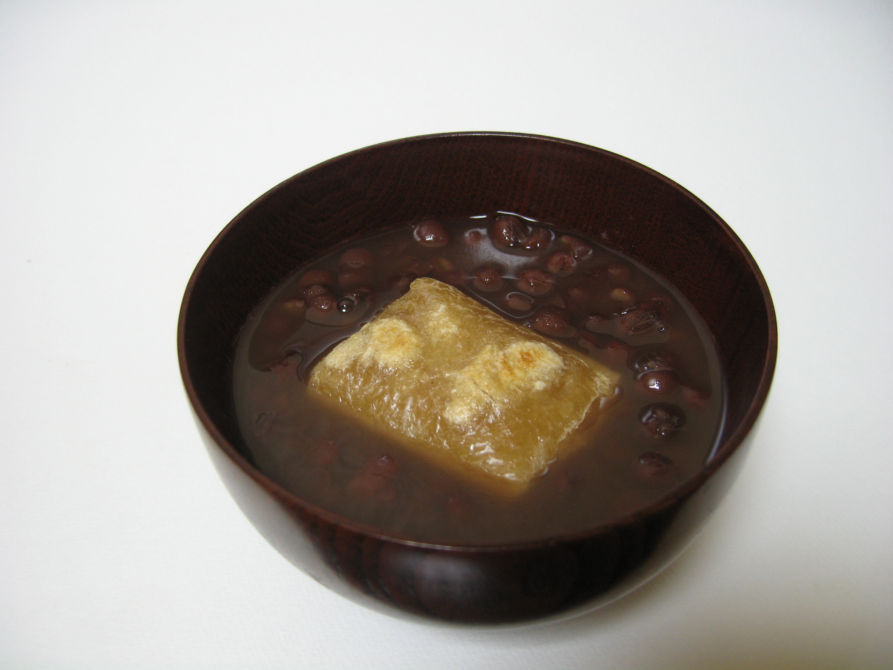 ぜんざいに玄米餅